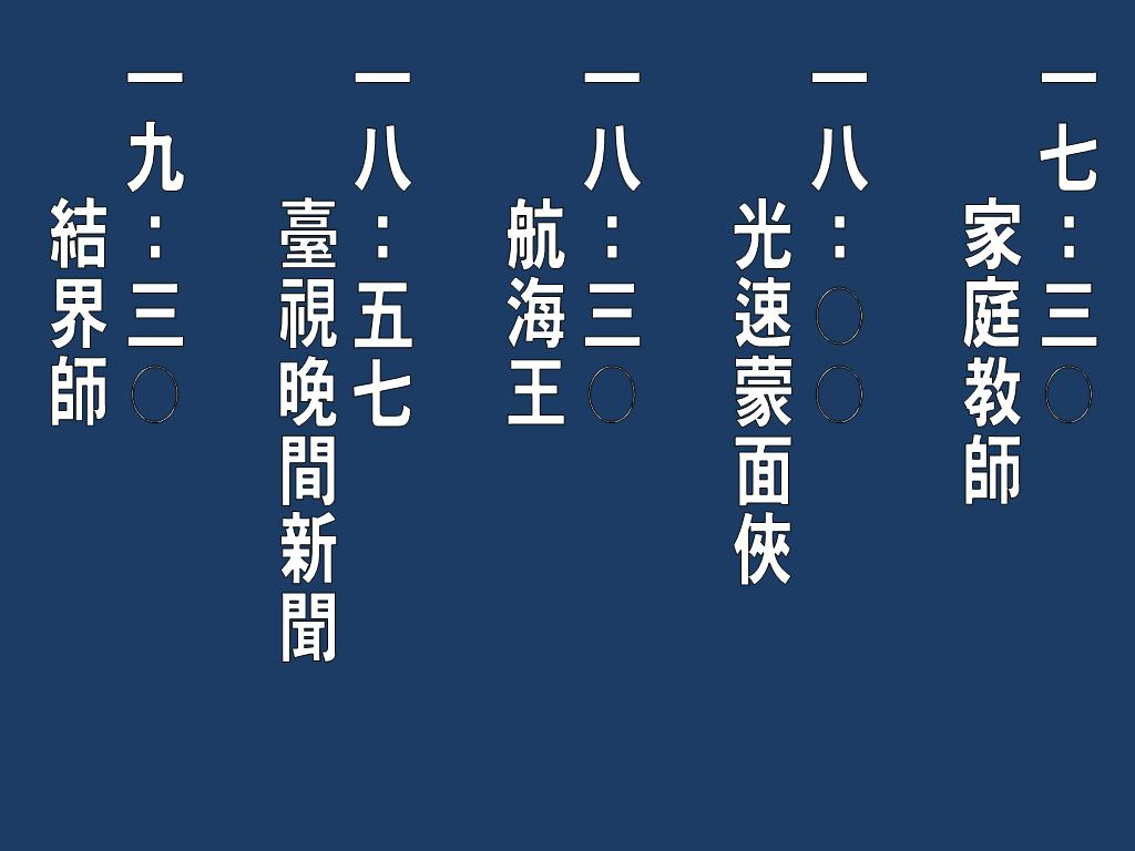 模擬台視收播前隔日節目預告一覽表。請注意，除了晚間新聞外，其他四個電視節目名稱為虛構內容，故此為模擬範例。